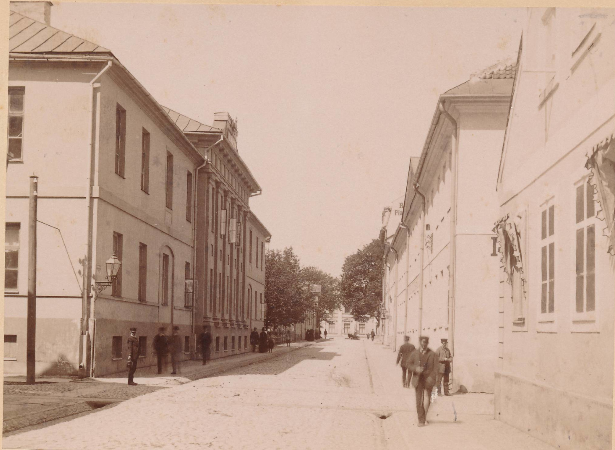 Rüütli tänav, vasakul kubermangugümnaasium. Tartu, 1870-1884